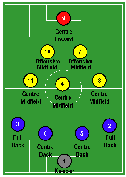 mia creazione